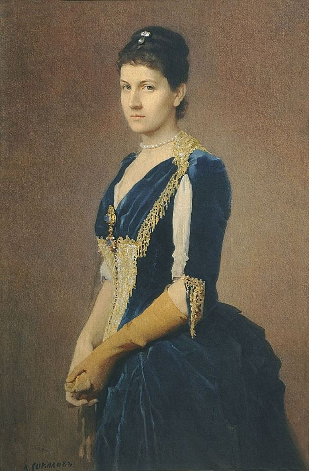 Княгиня Мария Григорьевна Щербатова, ур. Строганова (1857—1920), с 1879 года жена Алексея Григорьевича Щербатова, убита вместе с дочерью большевиками в своем имении Немиров Брацлавского уезда Подольской губернии.